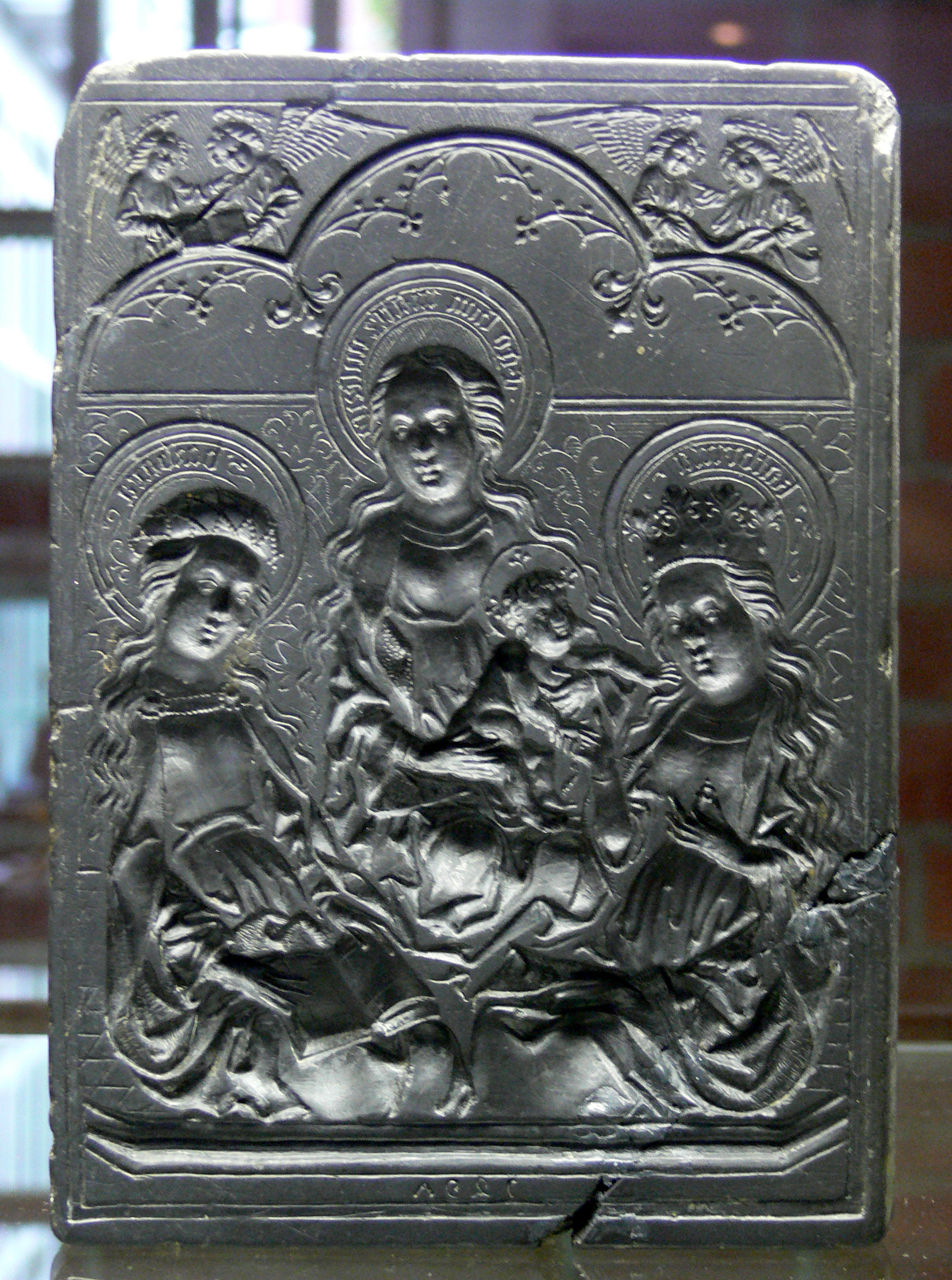 Gussform „Maria mit dem Kind zwischen den hl. Katharina und Barbara“; Graphitstein; Niederrhein, datiert 1467 Kunstgewerbemuseum Berlin, Inv. Nr. K 3054